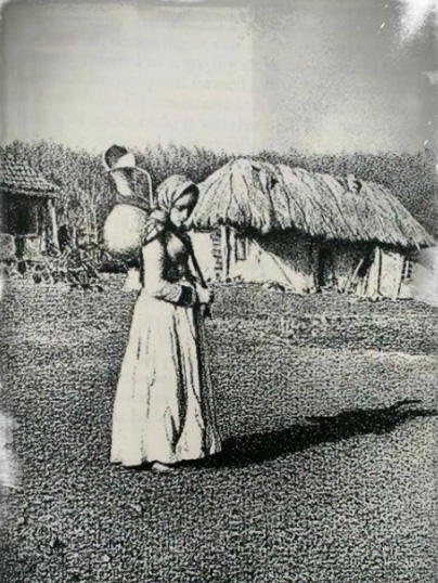 На картинке Эсмурзиева Хади Чадиевна